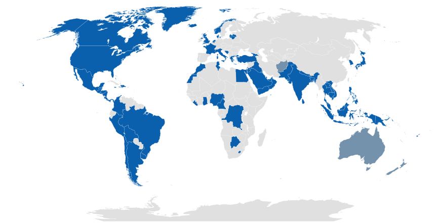 Страны, использующие m16 и различные его модификации